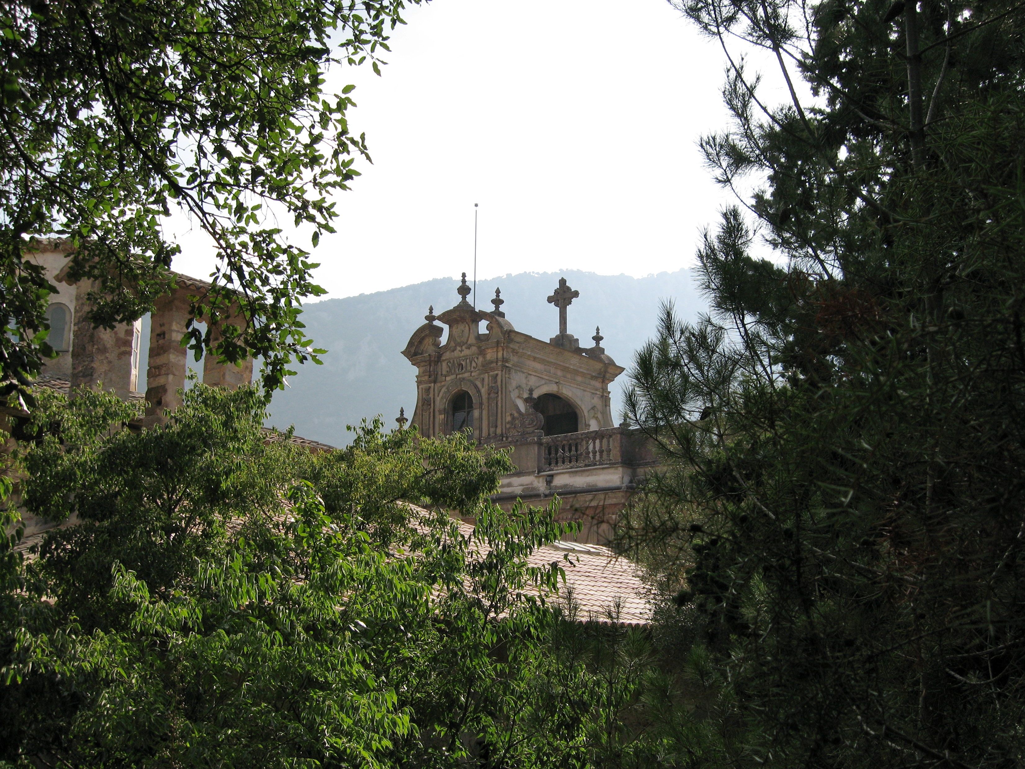 Santuari de Lluc, Gemeinde Escorca, Mallorca, Spanien